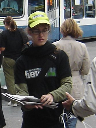 Promoaktion für die Tageszeitung "Heute" in der Stadt Zürich in der Nähe des Hauptbahnhofes.